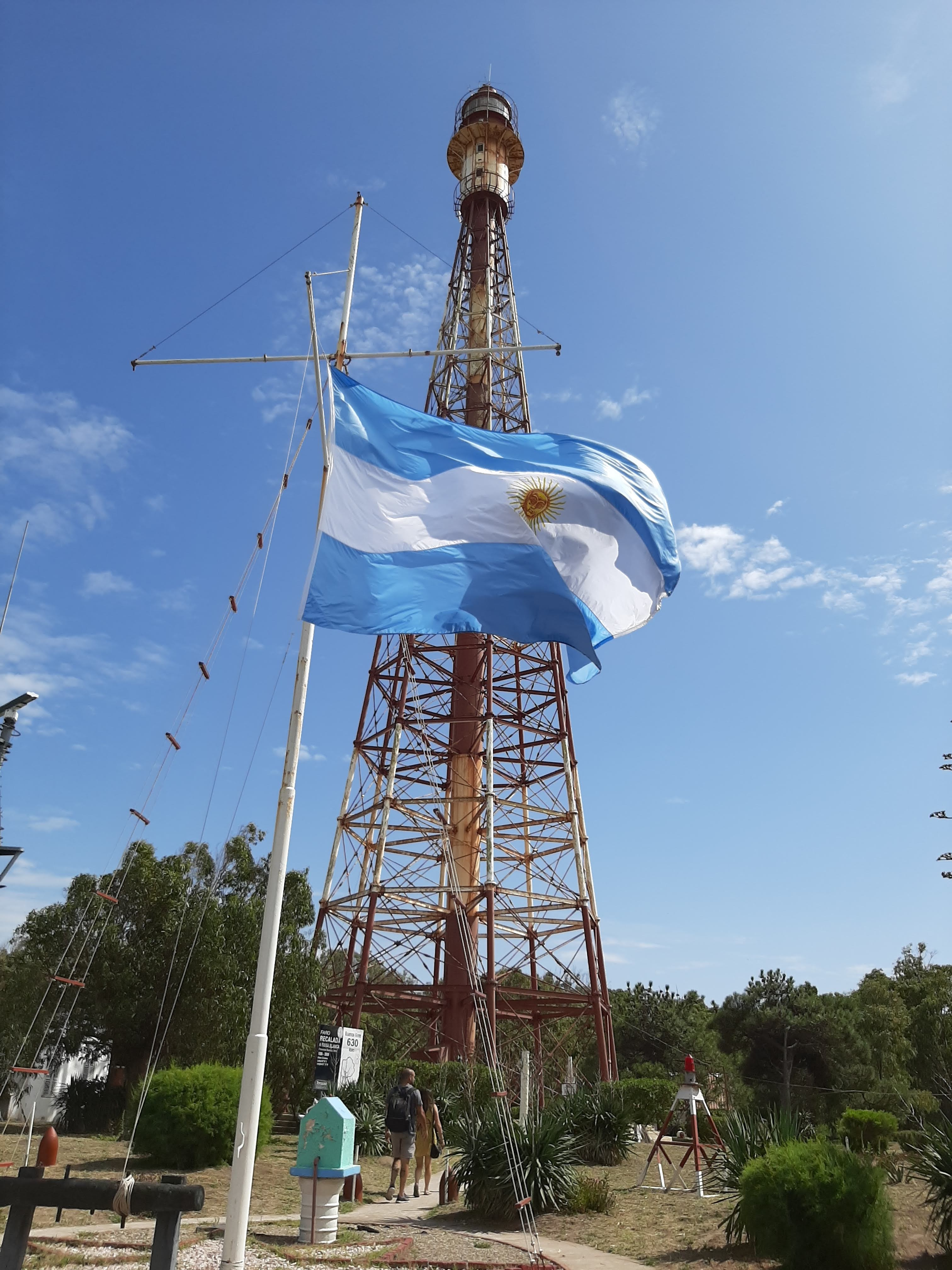 Hoy no se permite subir al faro.